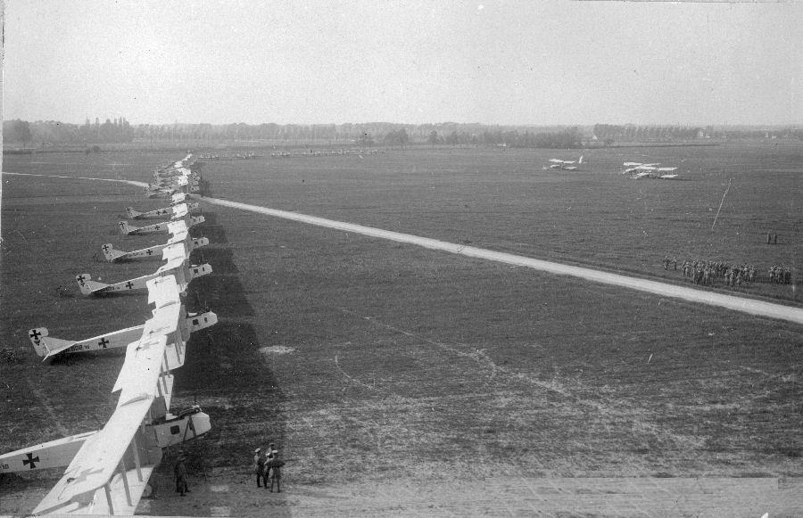 Beim Kagohl III, die Englandflieger Inspektion durch Feldmarschall Paul von Hindenburg, der sich die Einsatzbereitschaft des Geschwaders ansehen möchte ....Rechts hinten sind die drei Führungsmaschinen zu erkennen, sie hatten spezielle Farbschemen, z. B. rote Seiten am hinteren Rumpfende um sie so sofort als Spezialflugzeuge kenntlich zu machen.